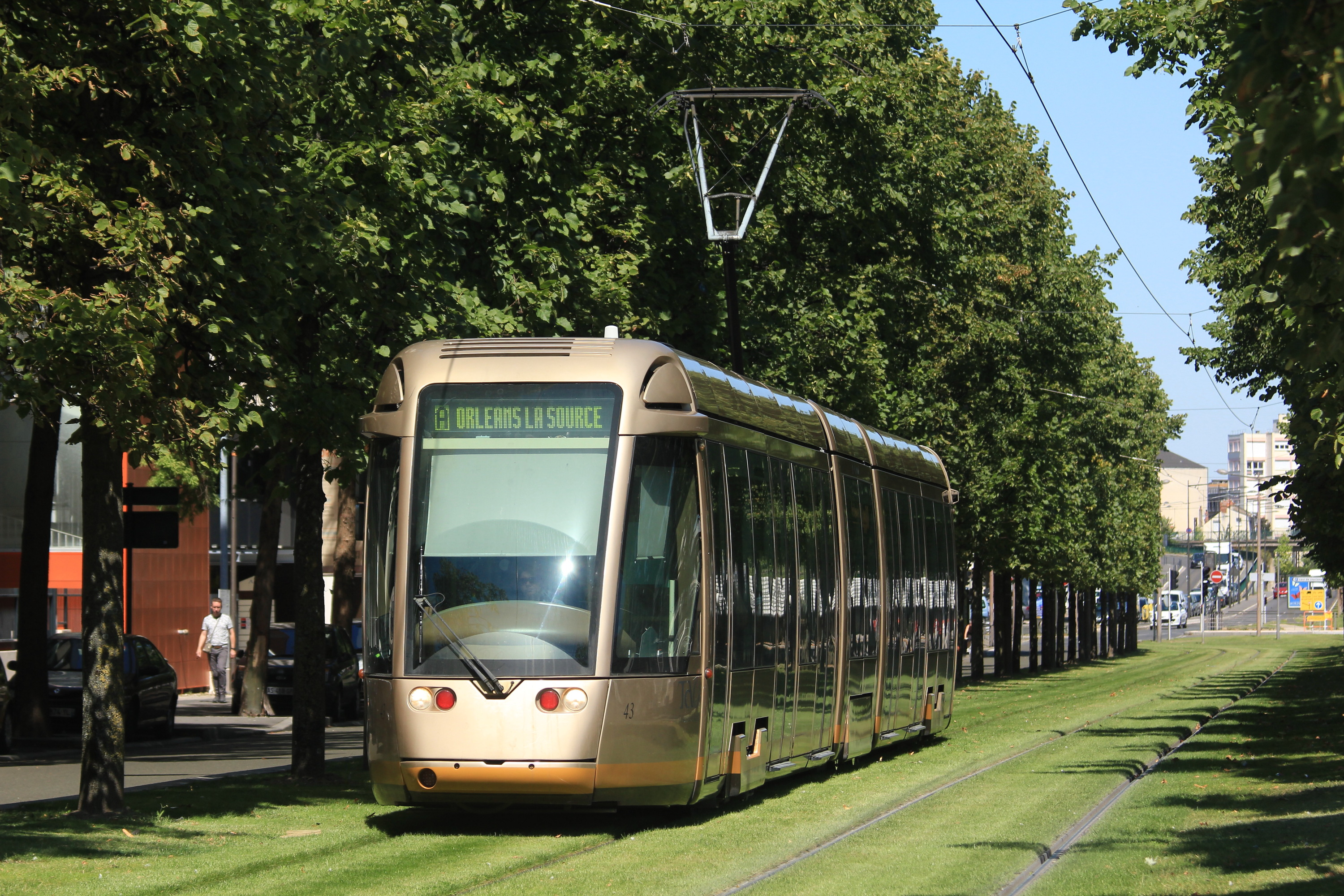 Tramway (Citadis 301) sur l'avenue de Paris à Orléans.